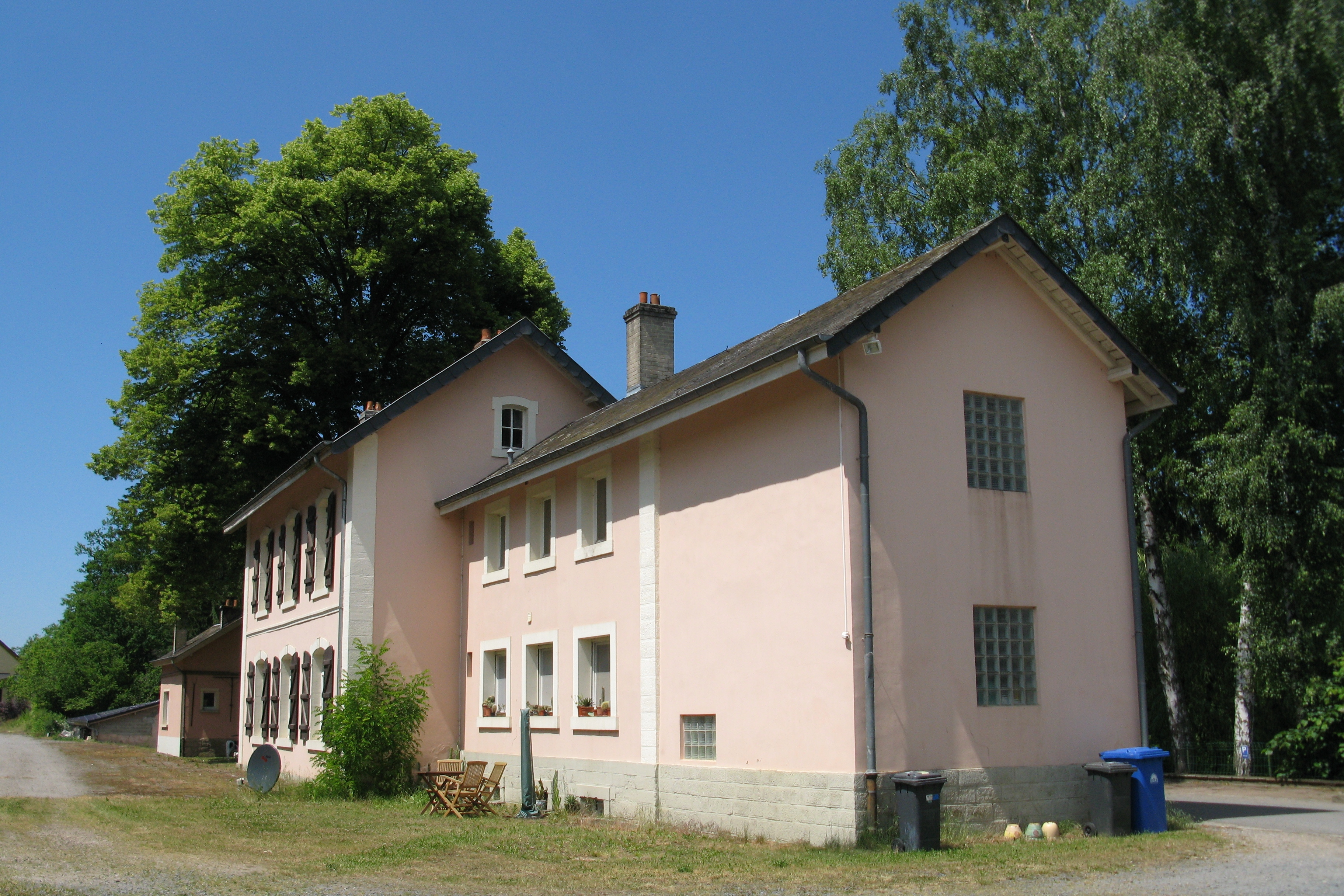 Gare vun Useldeng.